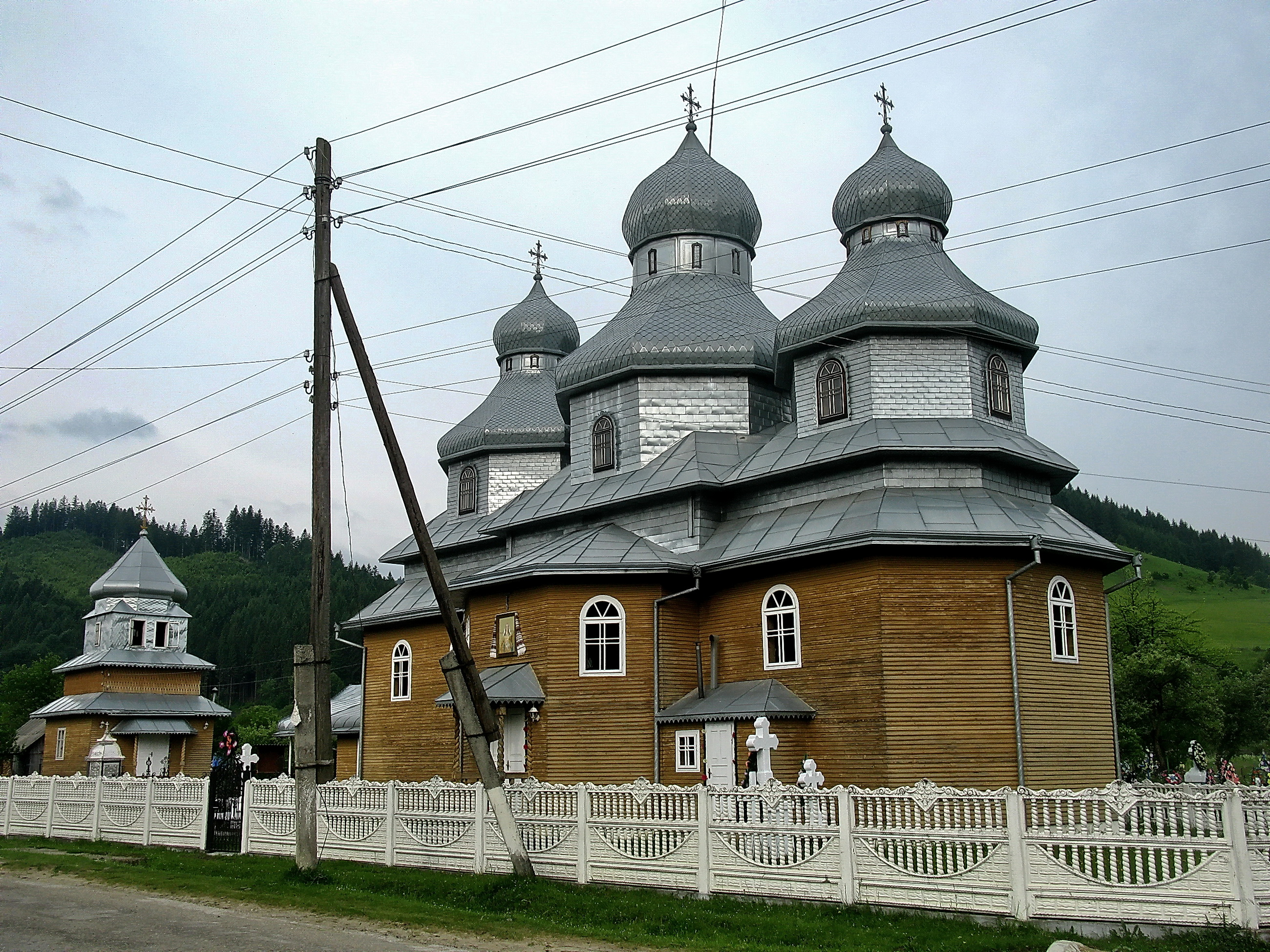 Церква Варвари та дзвіниця (дер.), с. Лопушна